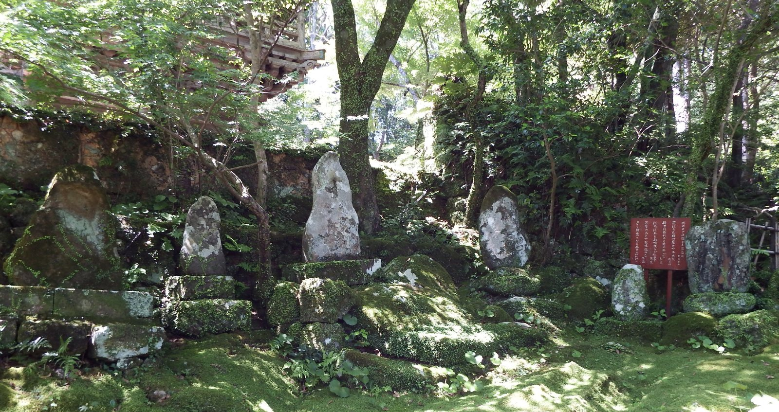 竹林寺の句碑の庭